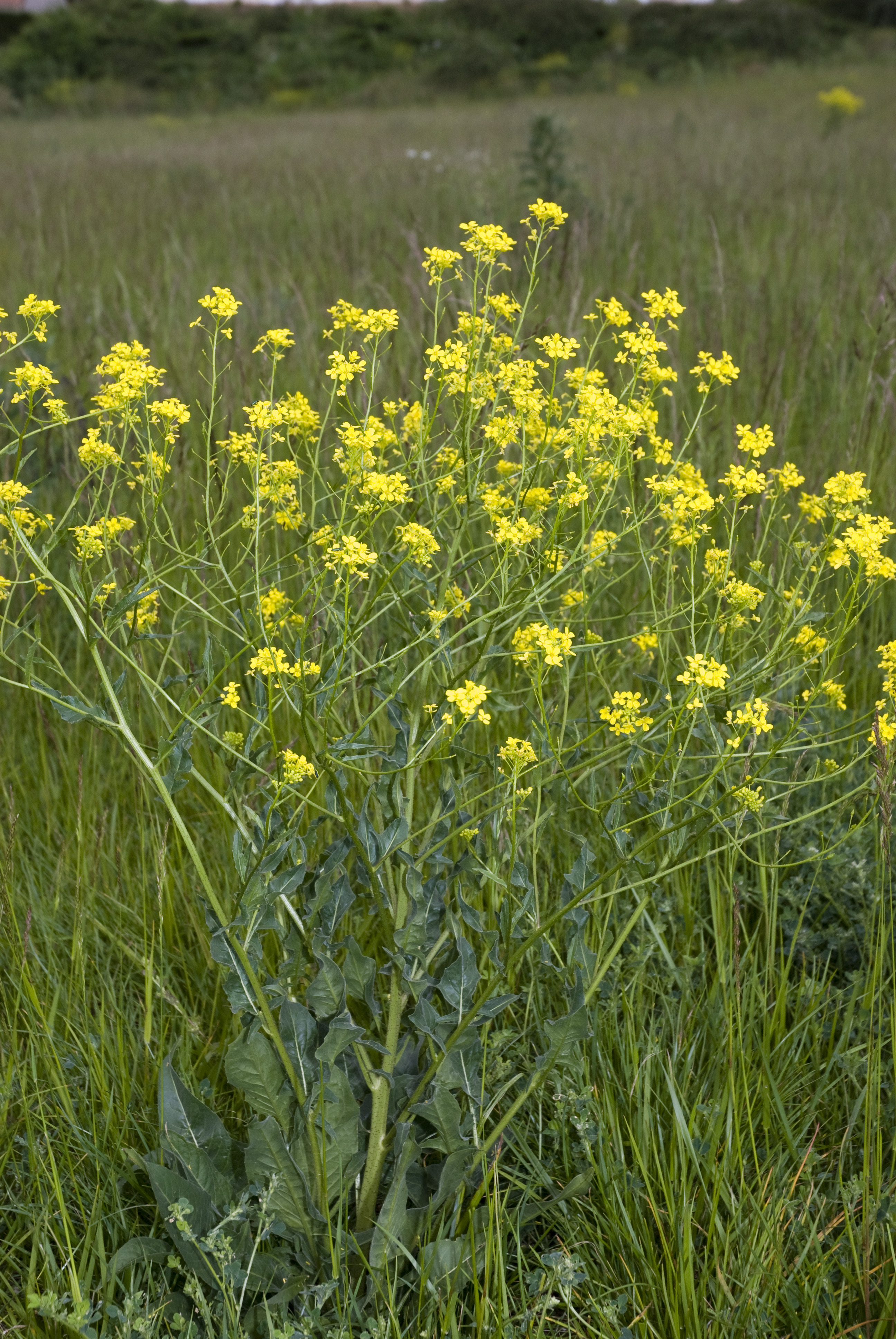 Bunias orientalis Champs Devaugermé, rue folie l'abbé à Château-Thierry (Aisne), France